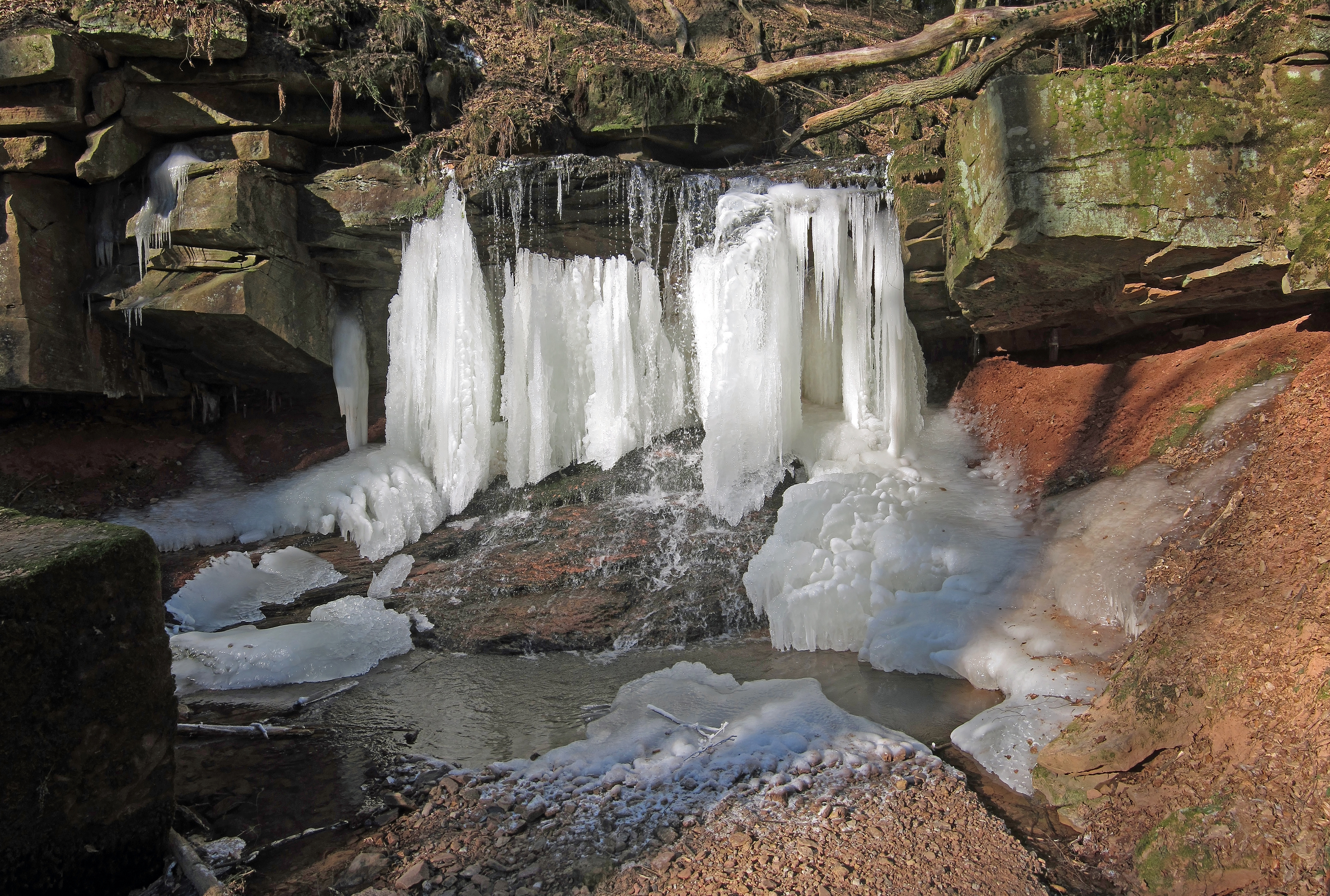 Tretstein Wasserfall, ein kleiner Wasserfall zwischen Wartmannsroth und Gräfendorf im südlichsten Teil der bayerischen Rhön. Der etwa drei Meter hoch freifallende Wasserfall ist als Naturdenkmal und als Geotop ausgewiesen. Bedingt durch die kalte Witterung im Februar 2012 ist der Wasserfall gefroren, was er zuletzt 1996/97 und 1987 war. Diese Datei wurde mit Hugin erstellt.